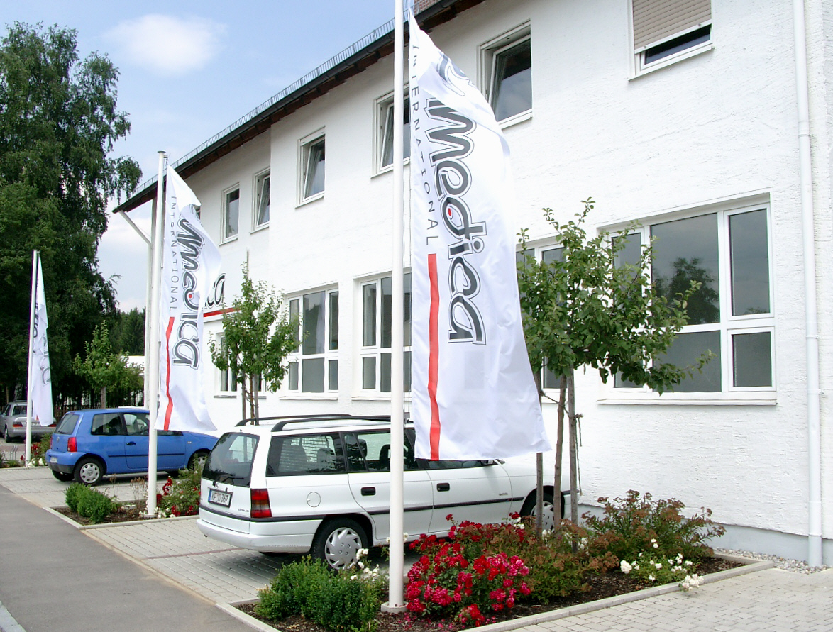 Zentrale der Hilfsorganisation humedica e.V. in Kaufbeuren